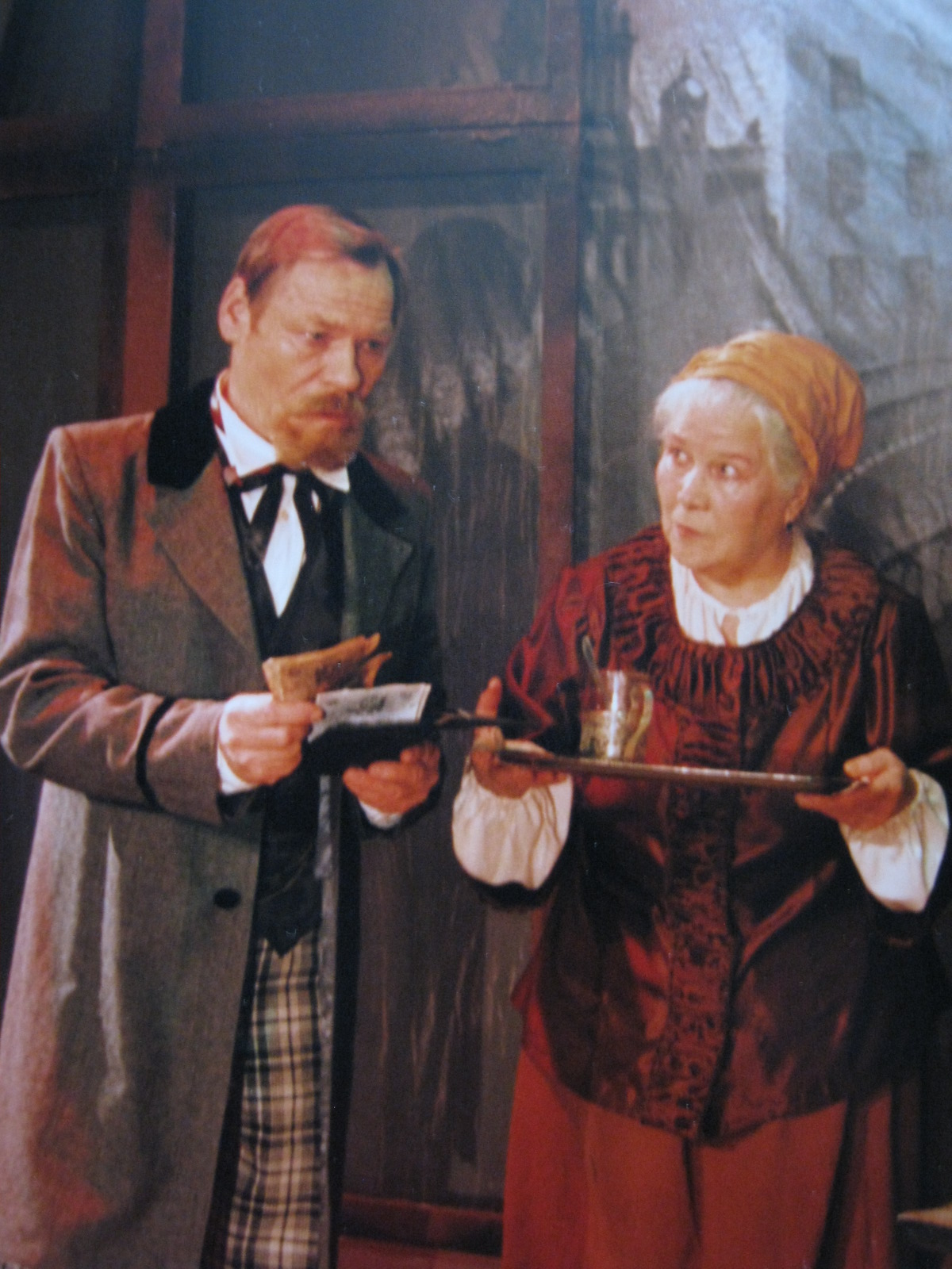 Сцена из спектакля «Дар Божий» Санкт-Петербургского драматического театра «Патриот» РОСТО. В роли Стелловского Юрий Оськин, в роли Федосьи Нина Мазаева.